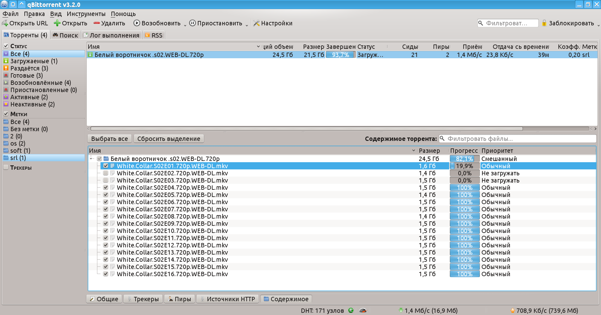 QBittorrent - Kubuntu 14.04.2 - загрузка